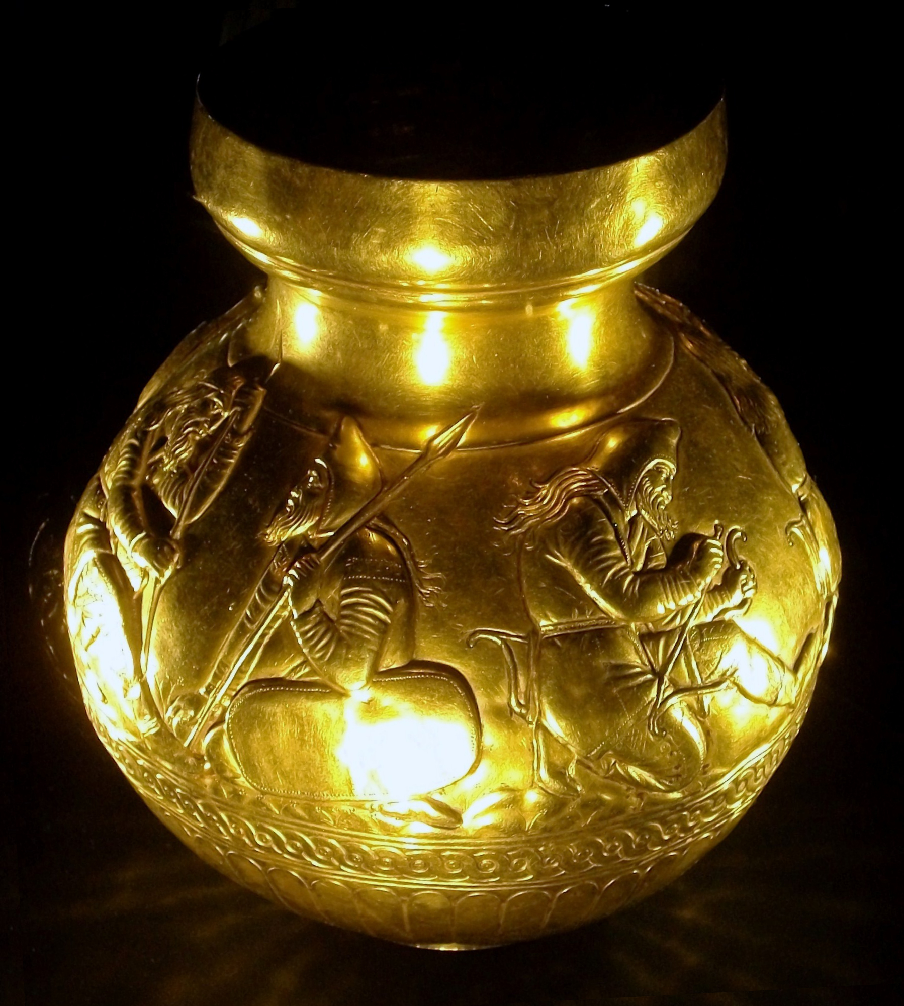 Vas d'or amb representació d'escites, kurgan de Kul-Oba, segona meitat del segle IV aC. Exhibt a l'exposició Ermitage. Tresors de l'arqueologia russa al MARQ. El vas d'or del kurgan de Kul-Oba és un dels màxims exponents de l'estil escito-grec i narra, potser, un episodi històric transmés per Heròdot. Aquest vas d'or, la funció del qual podria ser ritual, és un clar exemple de l'estil decoratiu escito-grec. Localitzat al kurgan de Kul-Oba, al costat del cos d'una possible sacersotessa, es data al voltant de la segona meitat del segle IV aC. La decoració principal, en relleu, es disposa sobre un fris on apareixen diversos personatges, entre els quals destaca un escita que tensa la corda del seu arc. Aquesta imatge ens recorda l'episodi que descriu Heròdot sobre l'origen dels escites, segons la qual, Escita, el fill més jove d'Hèracles, es converteix en rei d'Escítia després de superar una prova: tensar l'arc de son pare, cosa que no pogueren aconseguir els seus germans majors, també representats al vas, i que resultaren ferits als peus i a la mandíbula en intentar-ho. No es tracta d'una escena de la vida quotidiana sinó, potser, d'una narració èpica o mitològica reflectida, probablement, per un artesà grec doncs les figures estan representades amb un gran realisme.